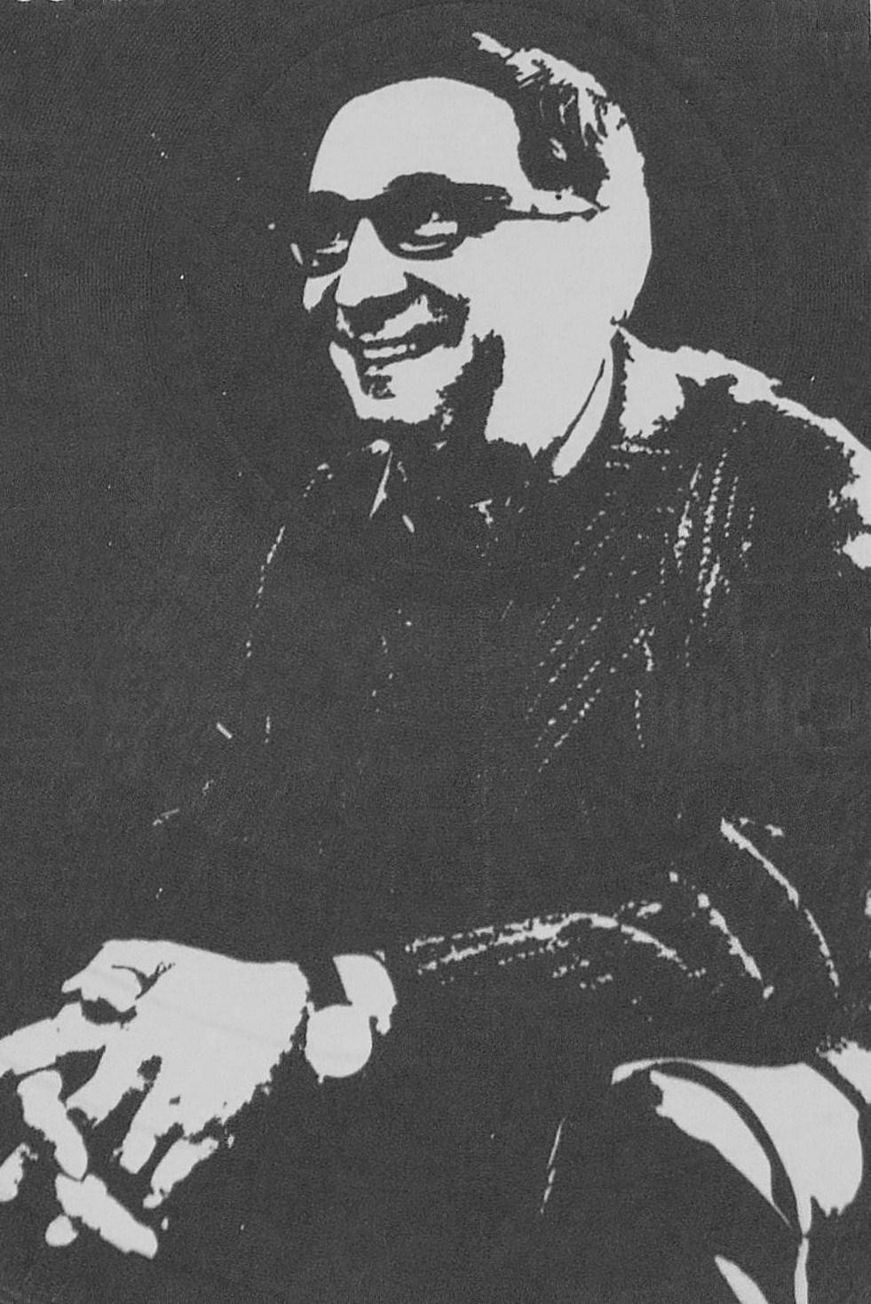 Leopold Tyrmand, polski literat.